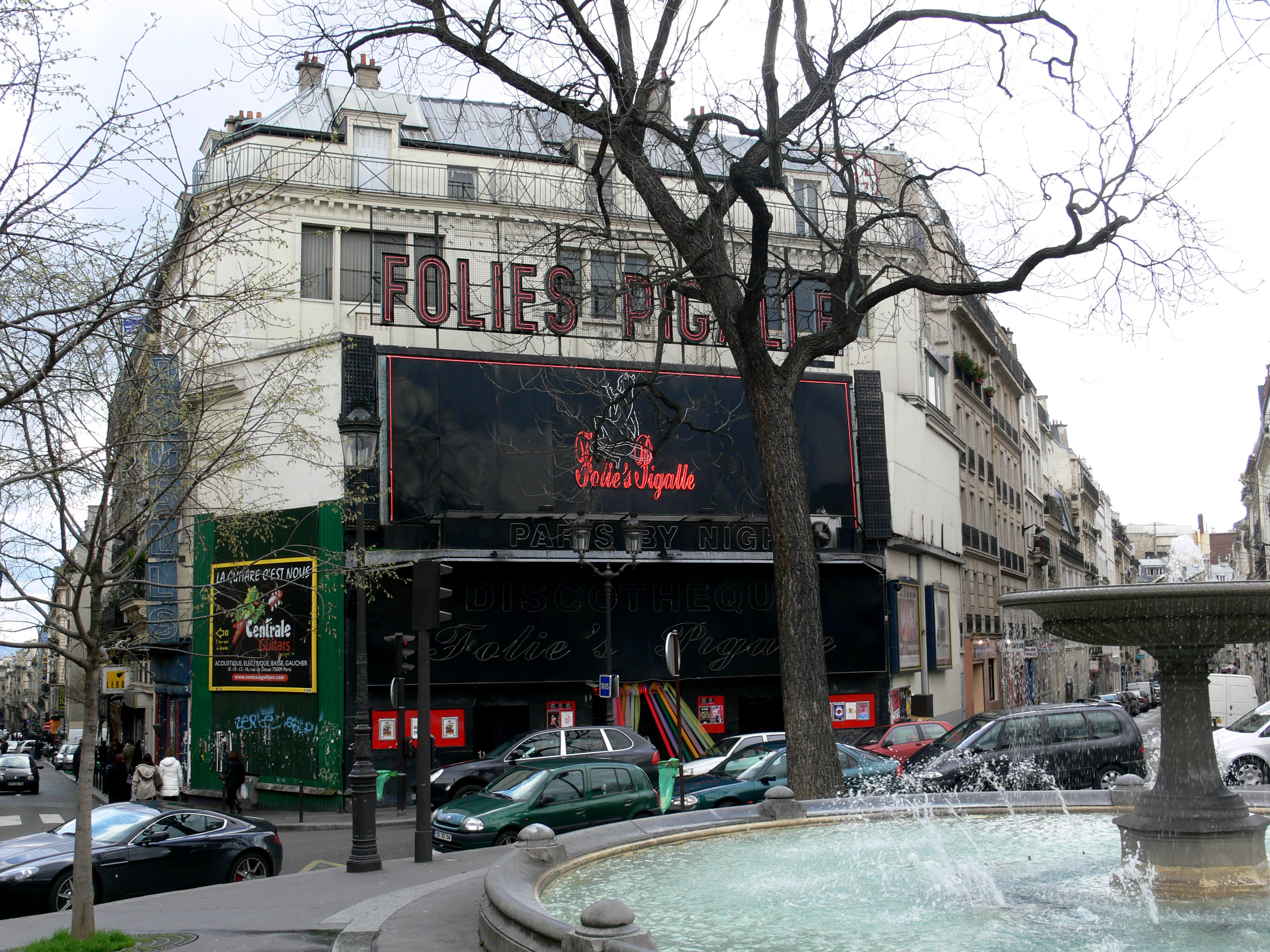 Folies Pigalle, place Pigalle, Paris IXe, France